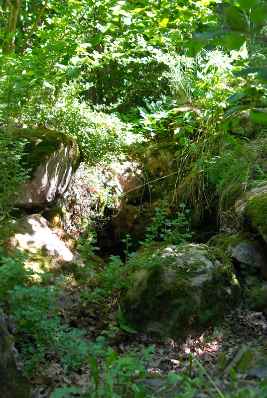 Bjärkaholm på Bosudde i Stångån. Lämningar av brunnen.